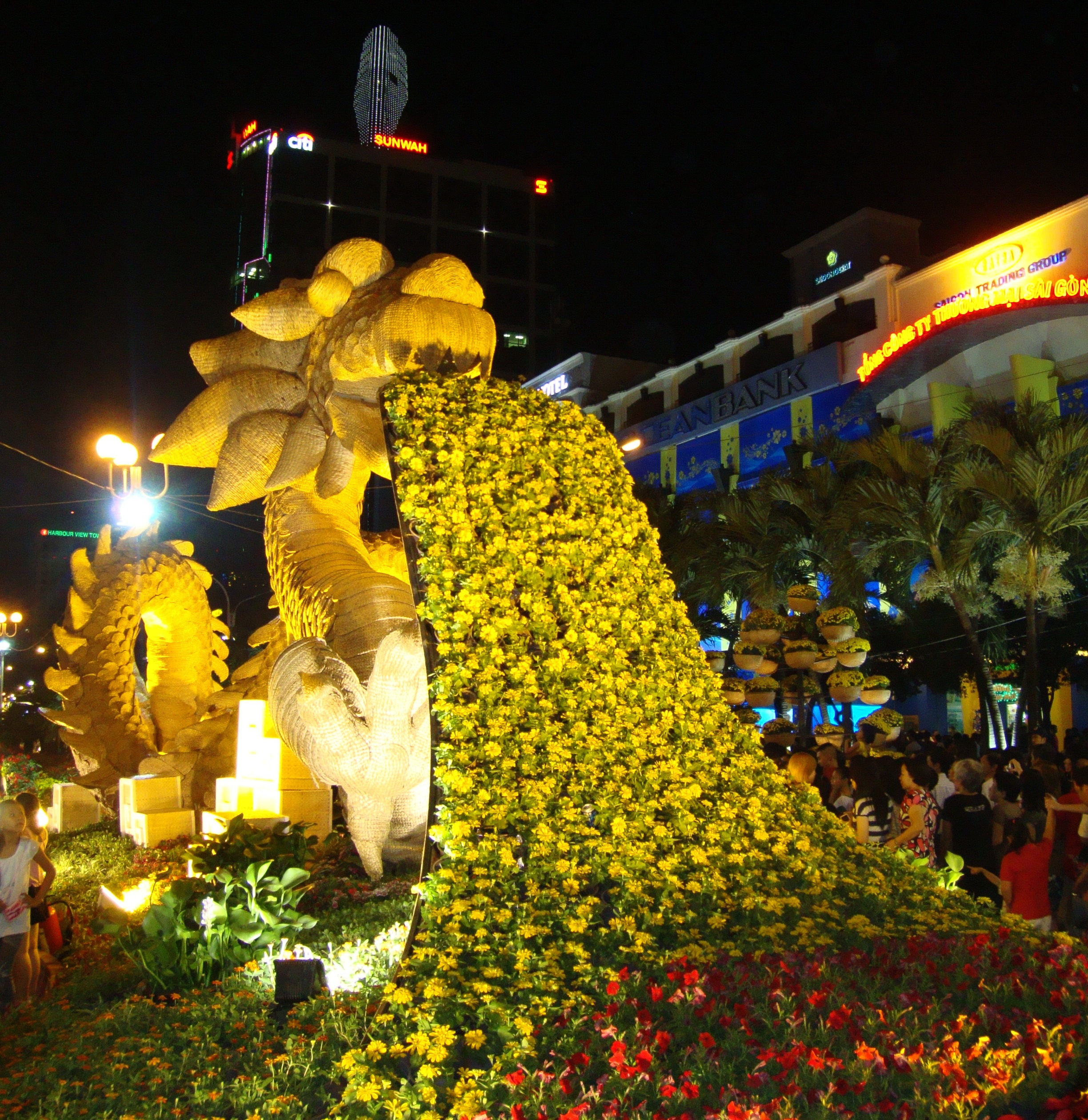 Biểu tượng năm 2012 của Đường hoa Nguyễn Huệ.